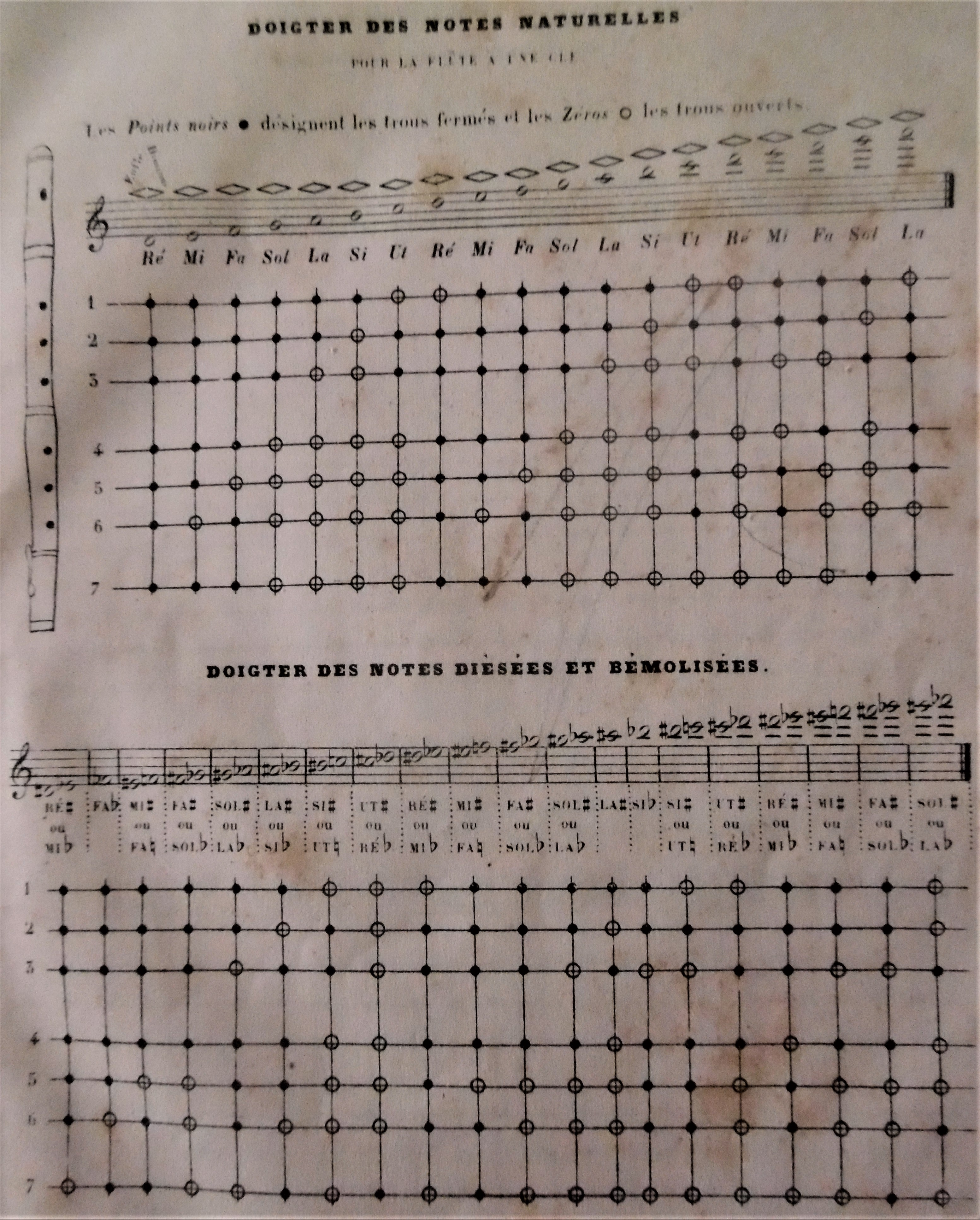 Tableau des doigtés de la flute à une clé (méthode de flûte de François Devienne)